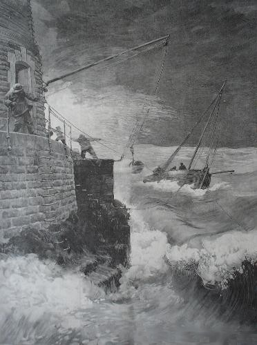 "Autour d'Ouessant - Le ravitaillement du phare du Four". (Extrait de l'Illustration du samedi 4 juillet 1896) [selon la source]